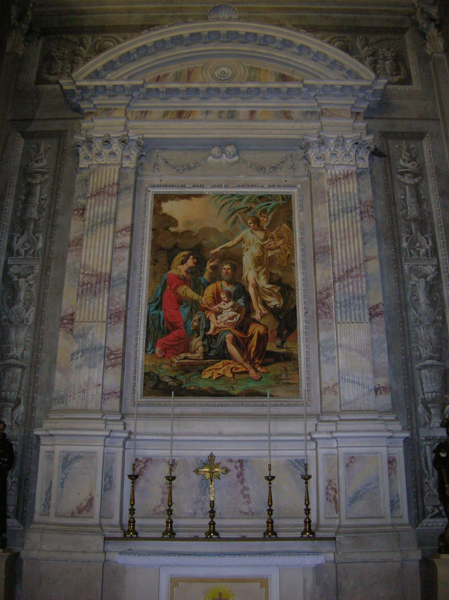 affresco raffigurante il Riposo durante la fuga in Egitto nella chiesa del Santo Crocefisso, ad Asso.JPG